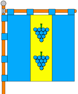 Прапор смт Підбуж